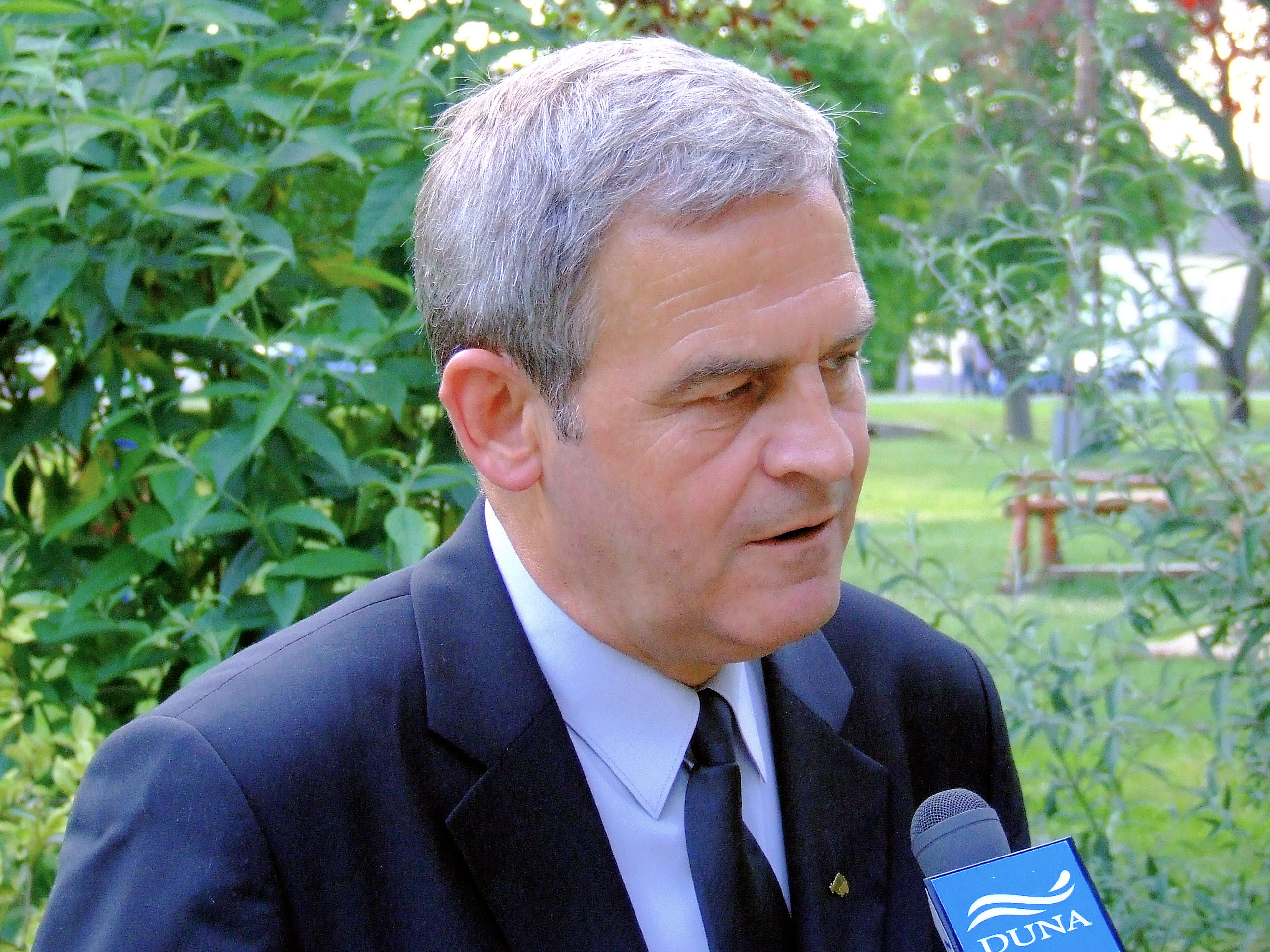 Tőkés László erdélyi magyar politikus